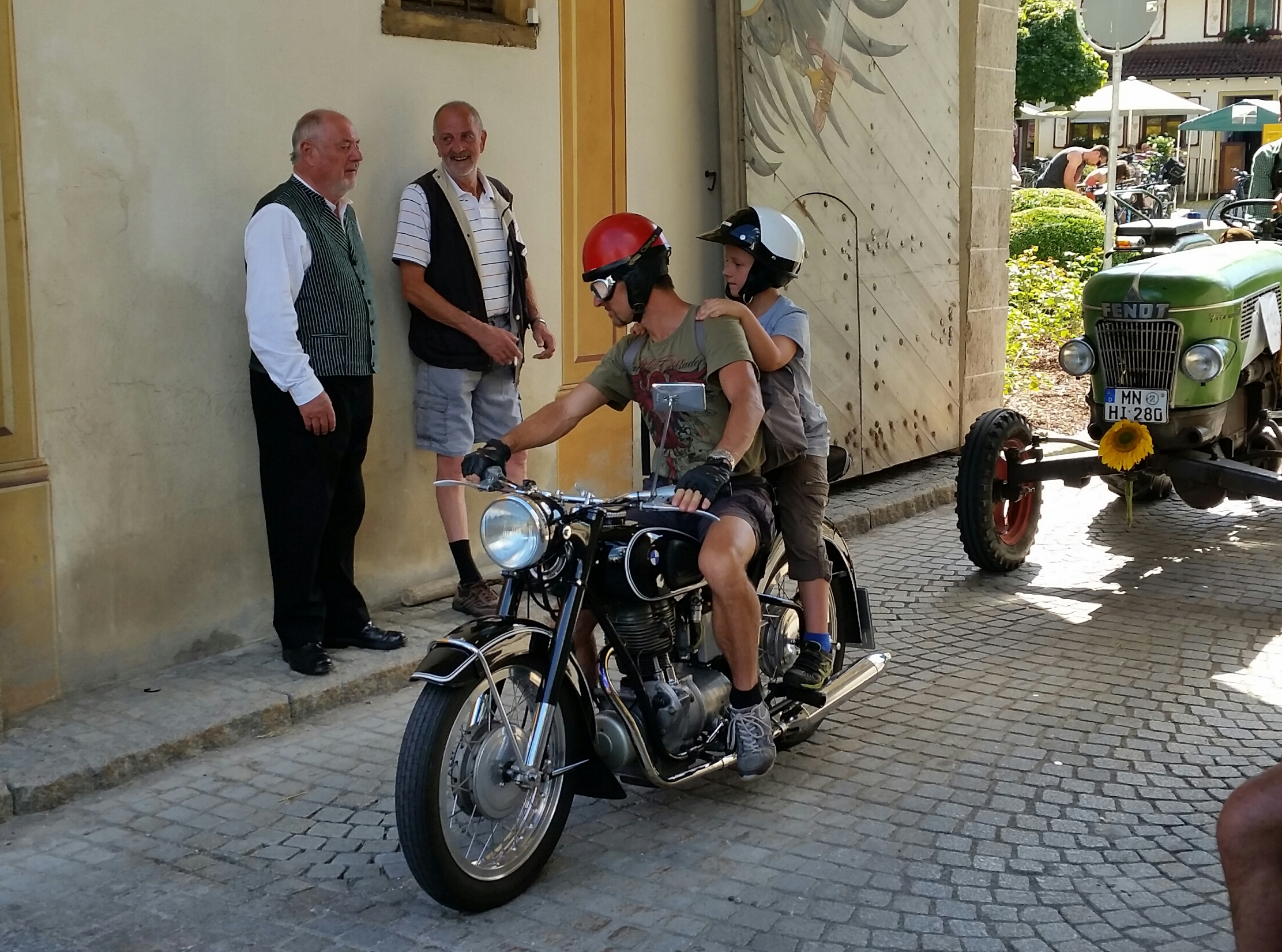 Dorffest Rot an der Rot 2016